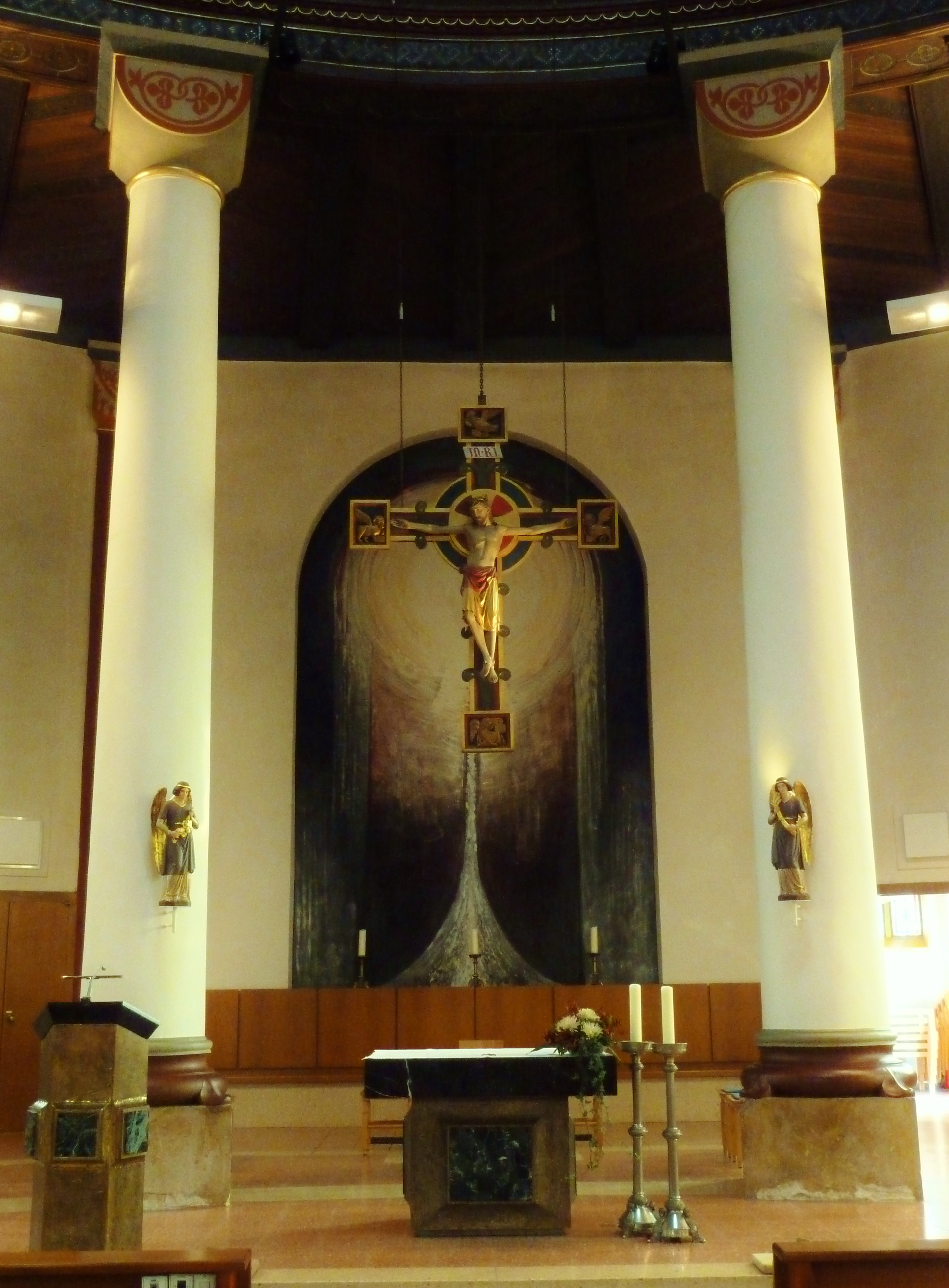 Altarraum und Triumpfkreuz St. Petruskirche in Gesmold